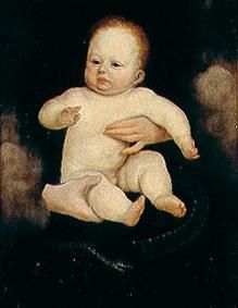 Kopie des Christuskindes nach Holbeins Solothurner Madonna, Gemälde von Hans Bock d.Ä., vor 1585/87, Öl auf Lindenholz, 35 x cm, Basel, Öffentliche Kunstsammlung, Kunstmuseum